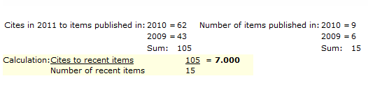 ضریب تاثیر